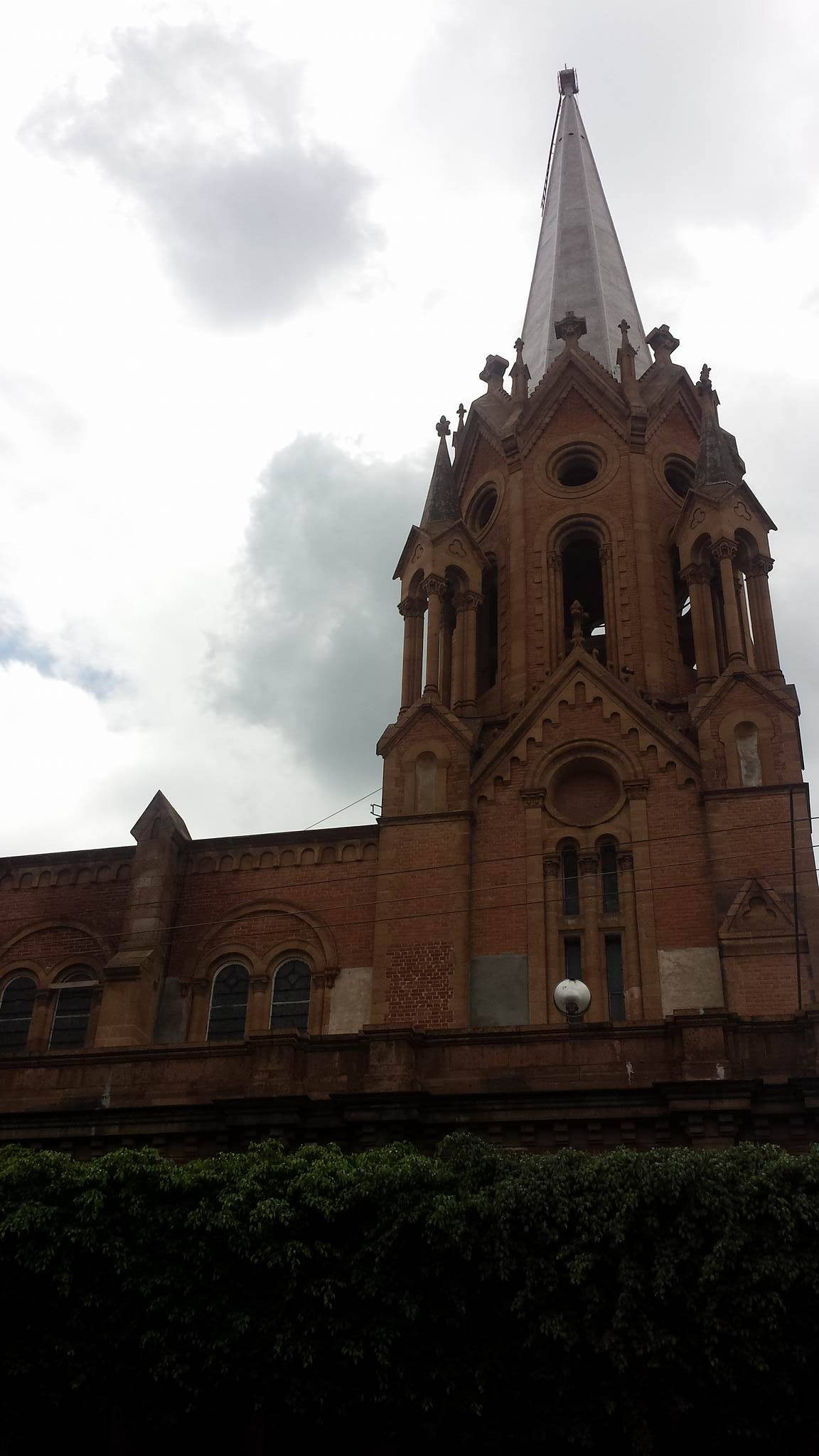 aguja del templo